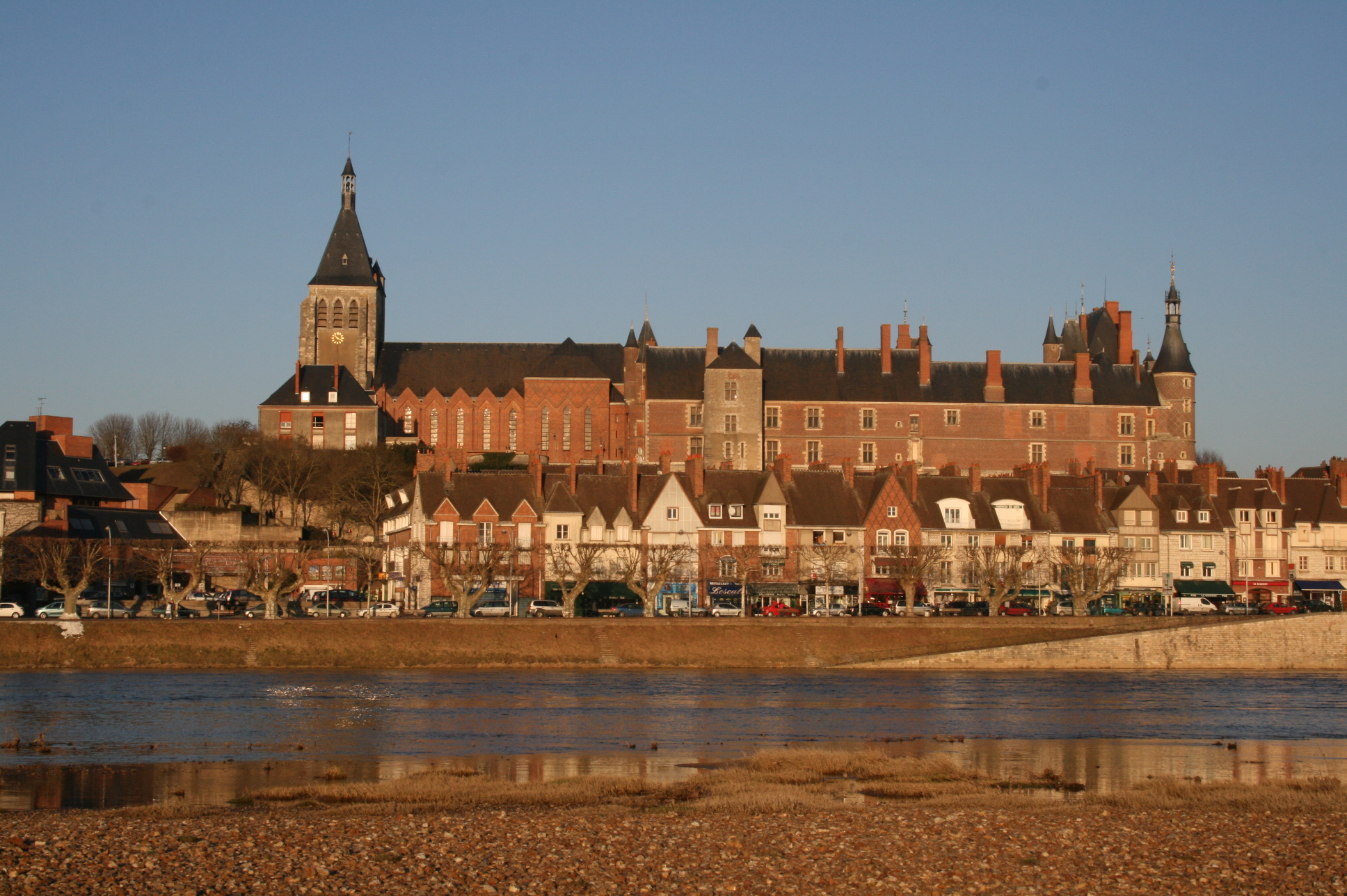 Château de Gien (Loiret - France) - Vue à partir du lit de la Loire (hiver - soleil couchant)